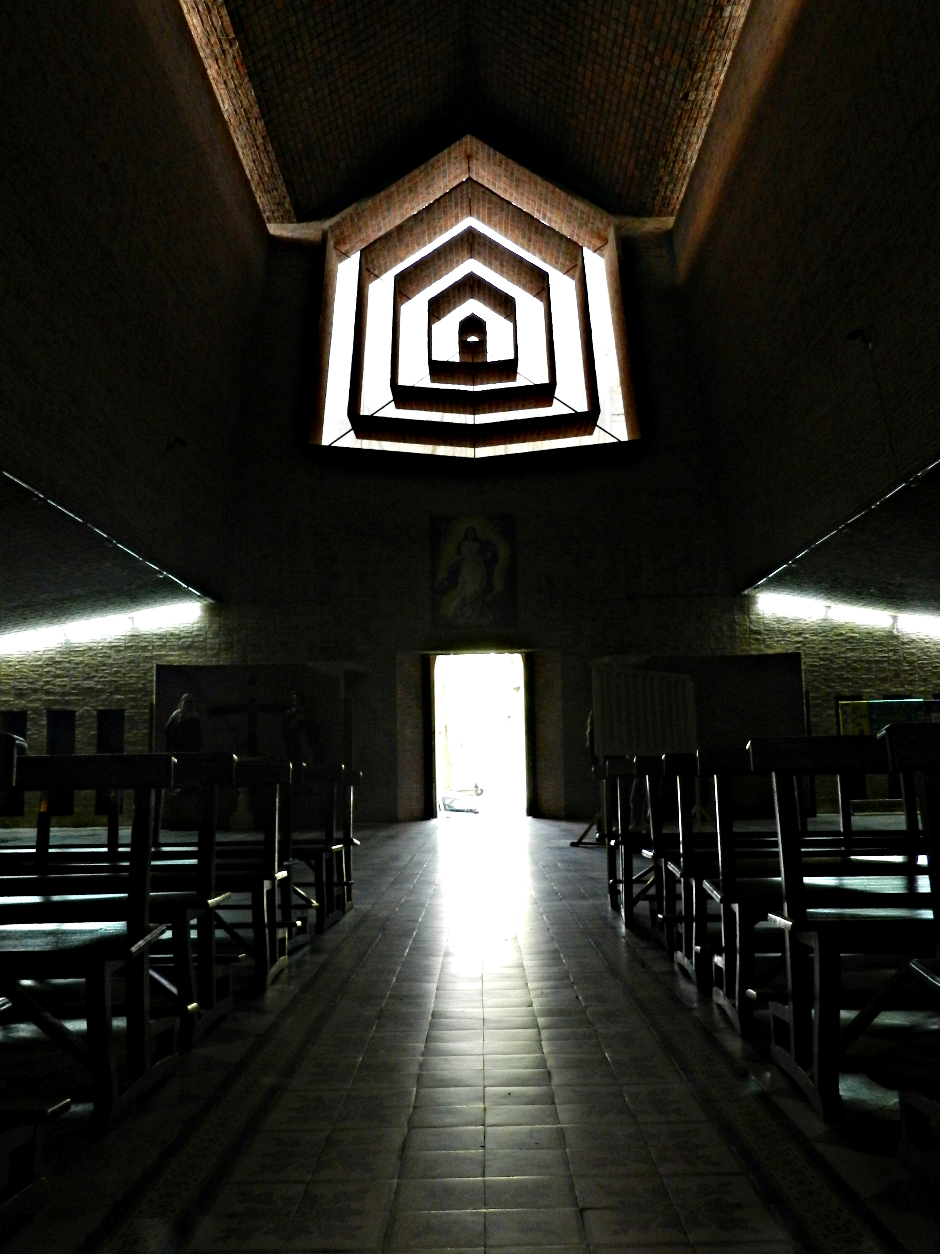 Iglesia San Pedro de Durazno. Ubicada en el departamento de Durazno